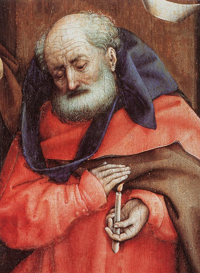 detail